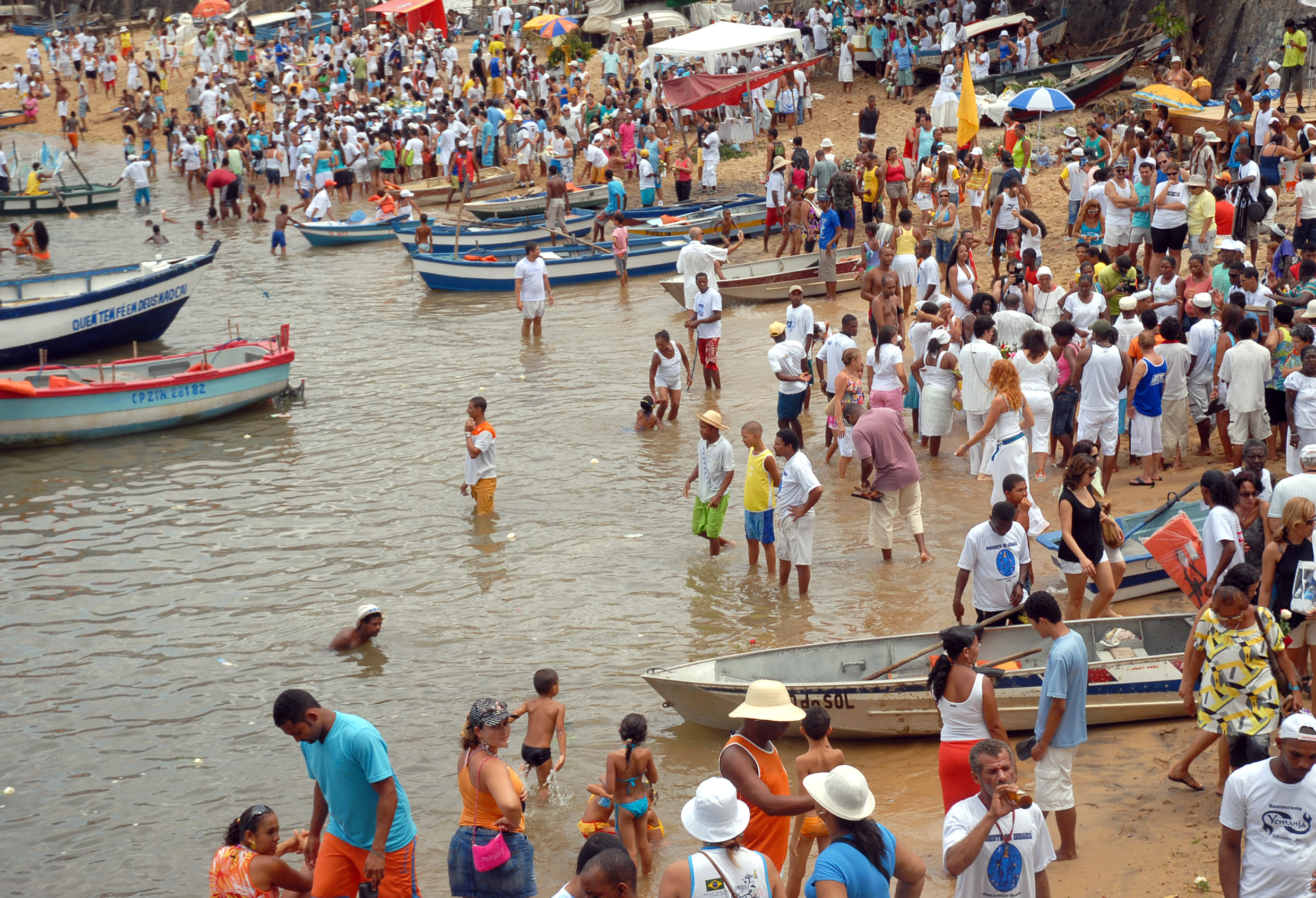 Presente de Iemanjá na Praia do Rio Vermelho, Salvador, Bahia, Brazil